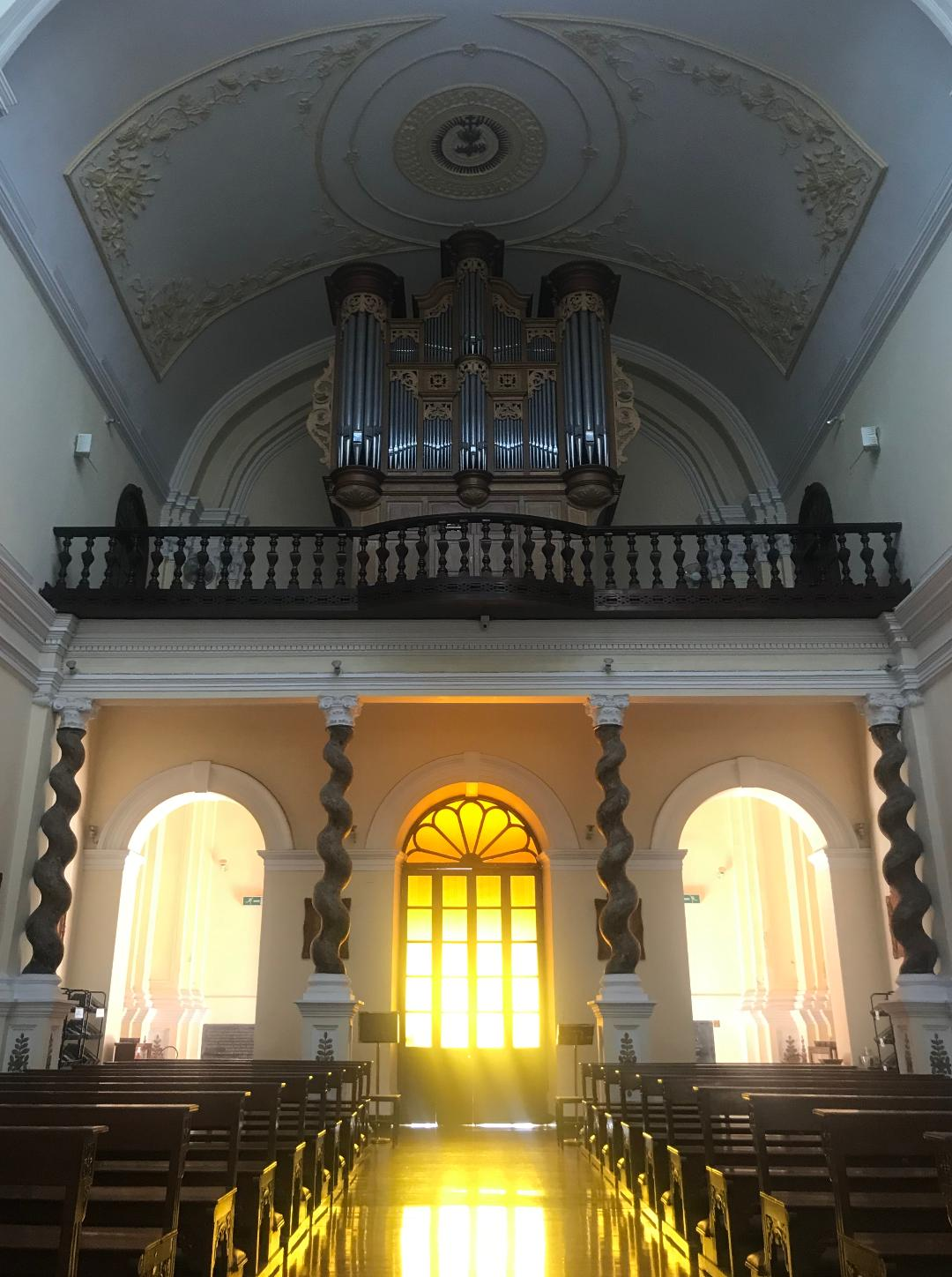 澳門聖若瑟聖堂的唱詩台